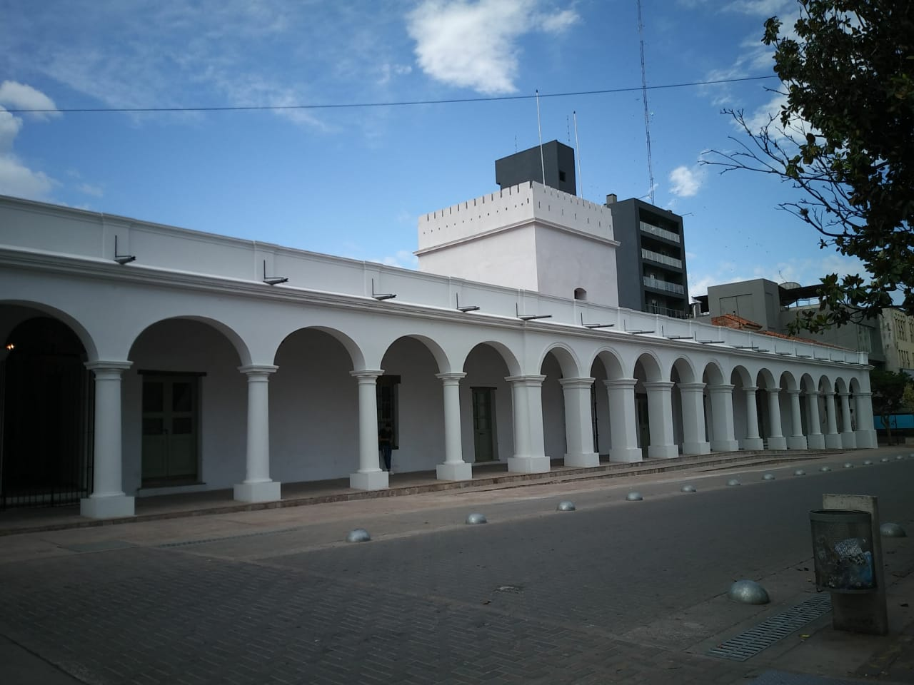 El cabildo durante muchos años, fue el edificio de la central de la Policia de la Provincia de Jujuy hasta que se traslado esta institución y se dispuso su refaccìón. Se completo la primera etapa (el frente) y se debe continuar con los trabajos. Este es el cabildo por donde desfiló el ejército de Belgrano.